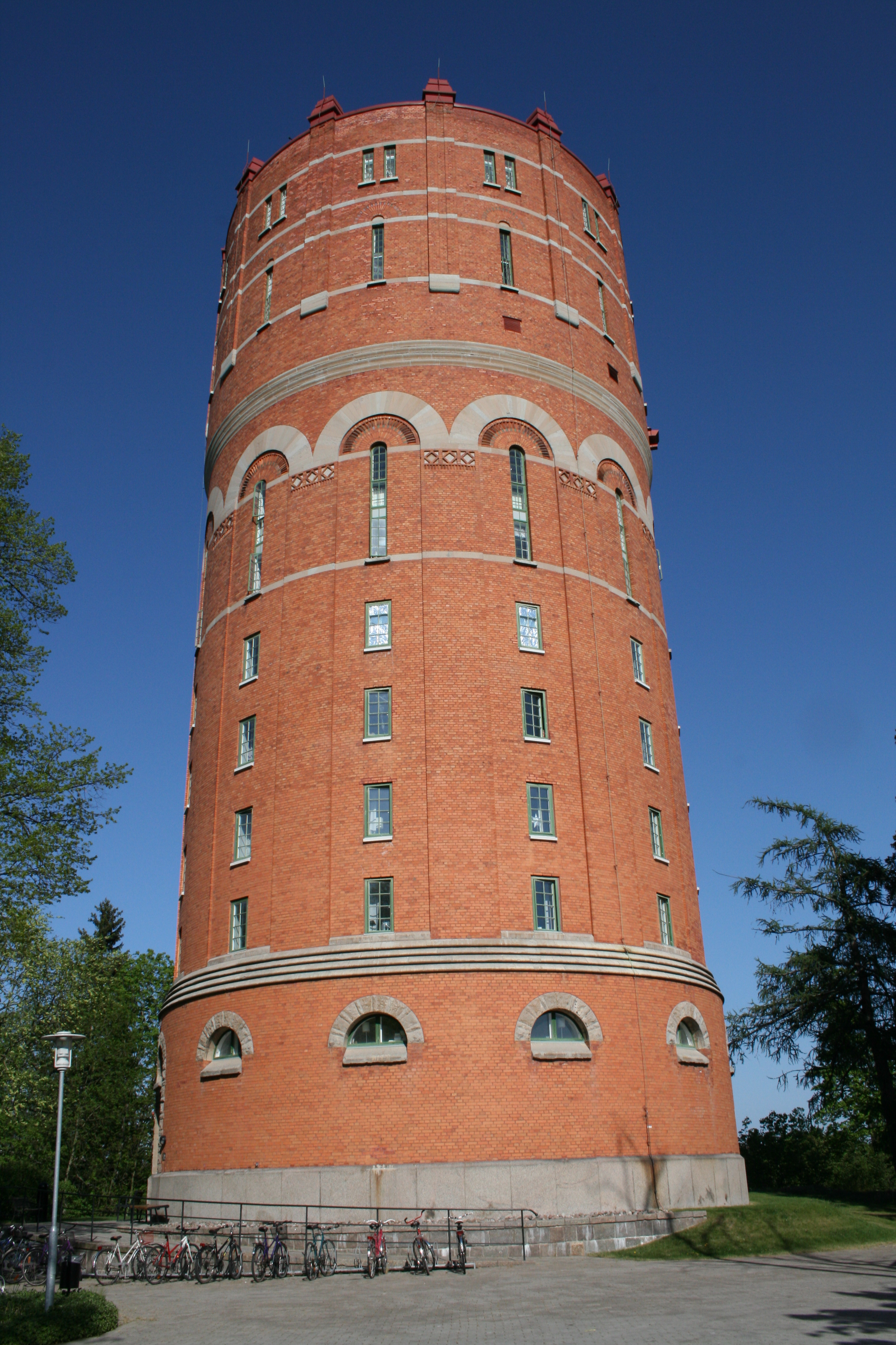 Gamla vattentornet i Norrköping